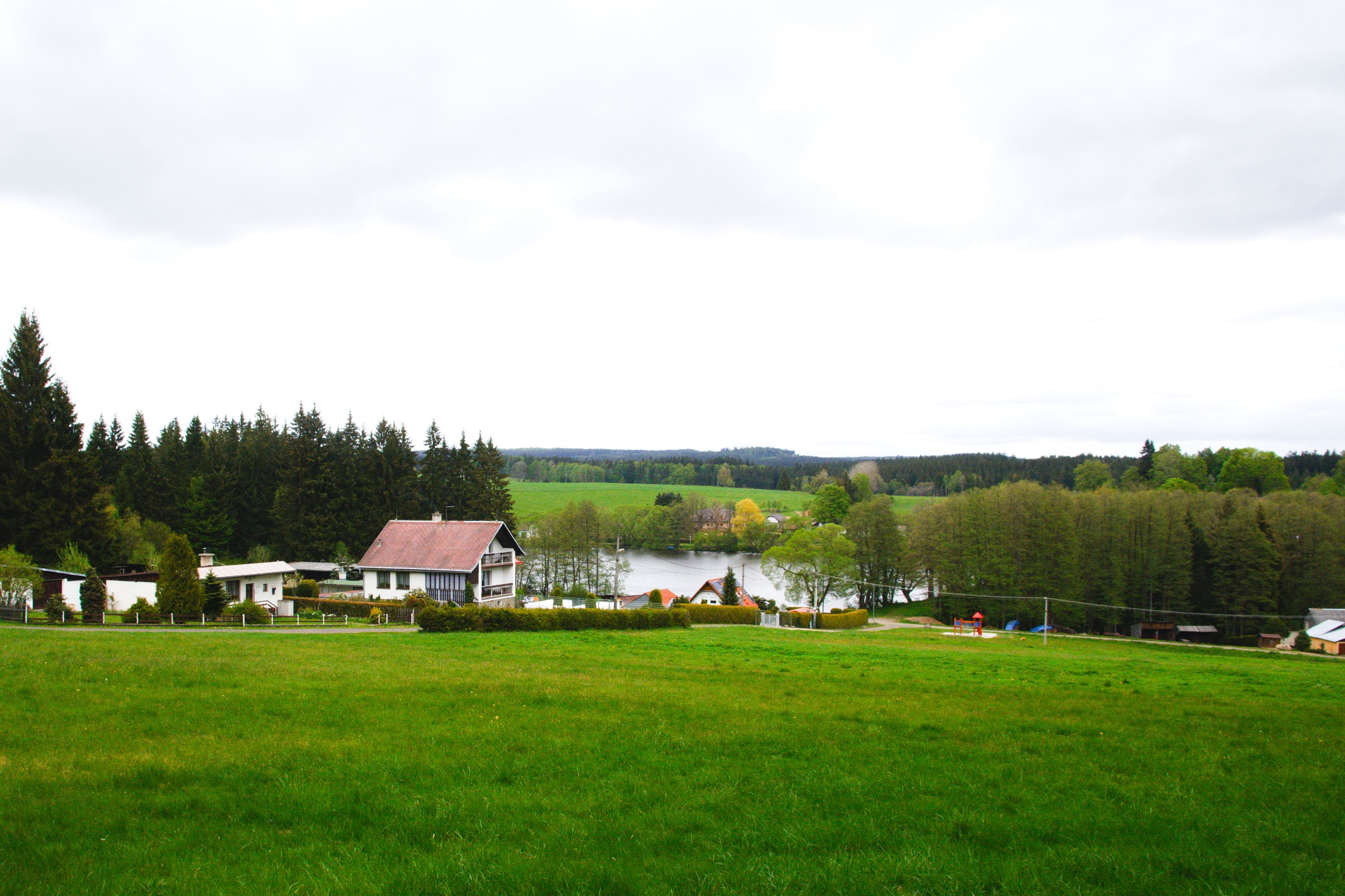 Branka, celkový pohled